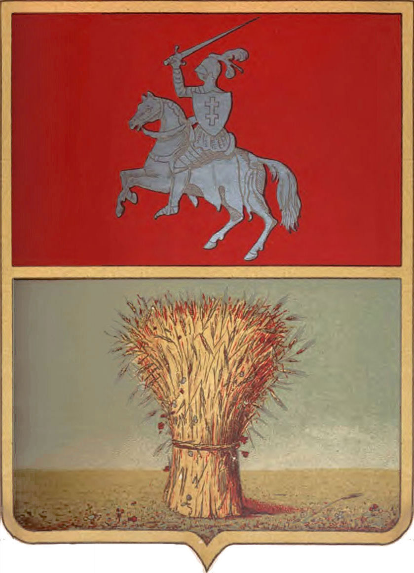 Беларуская (тарашкевіца): Герб Дзісенскага павету (Dzisna) з «Пагоняй» («Pahonia»)